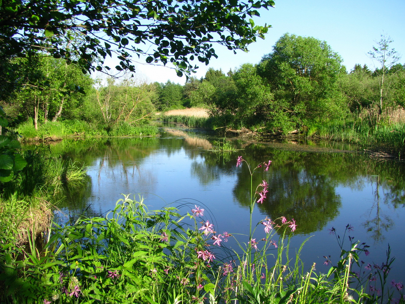 Цветущая Плиса